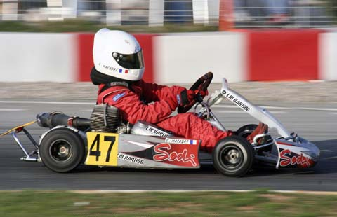 Gillian Macadré - Sodi - Parilla - Cadet